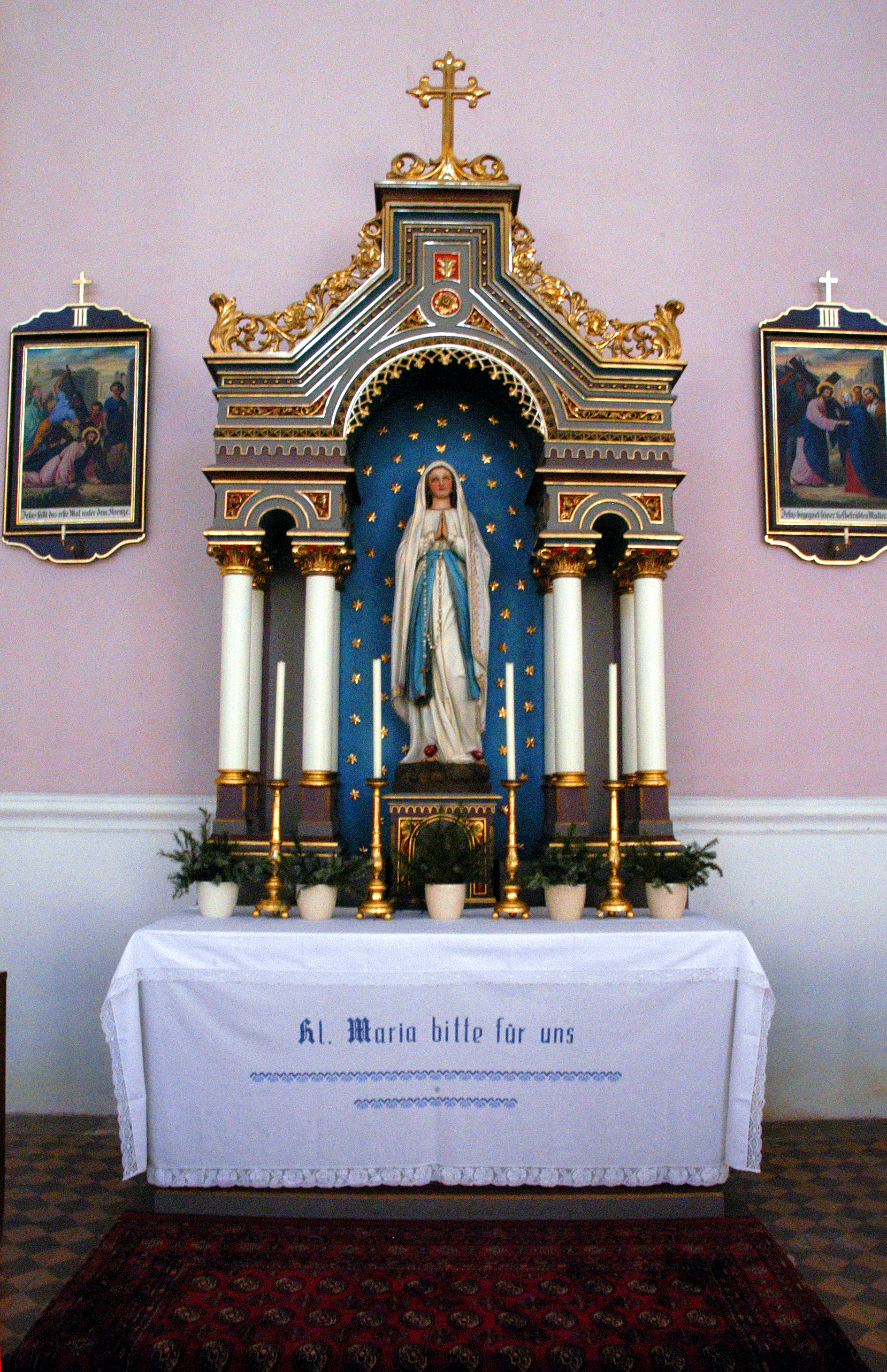 katholische Pfarrkirche heiliger Ulrich